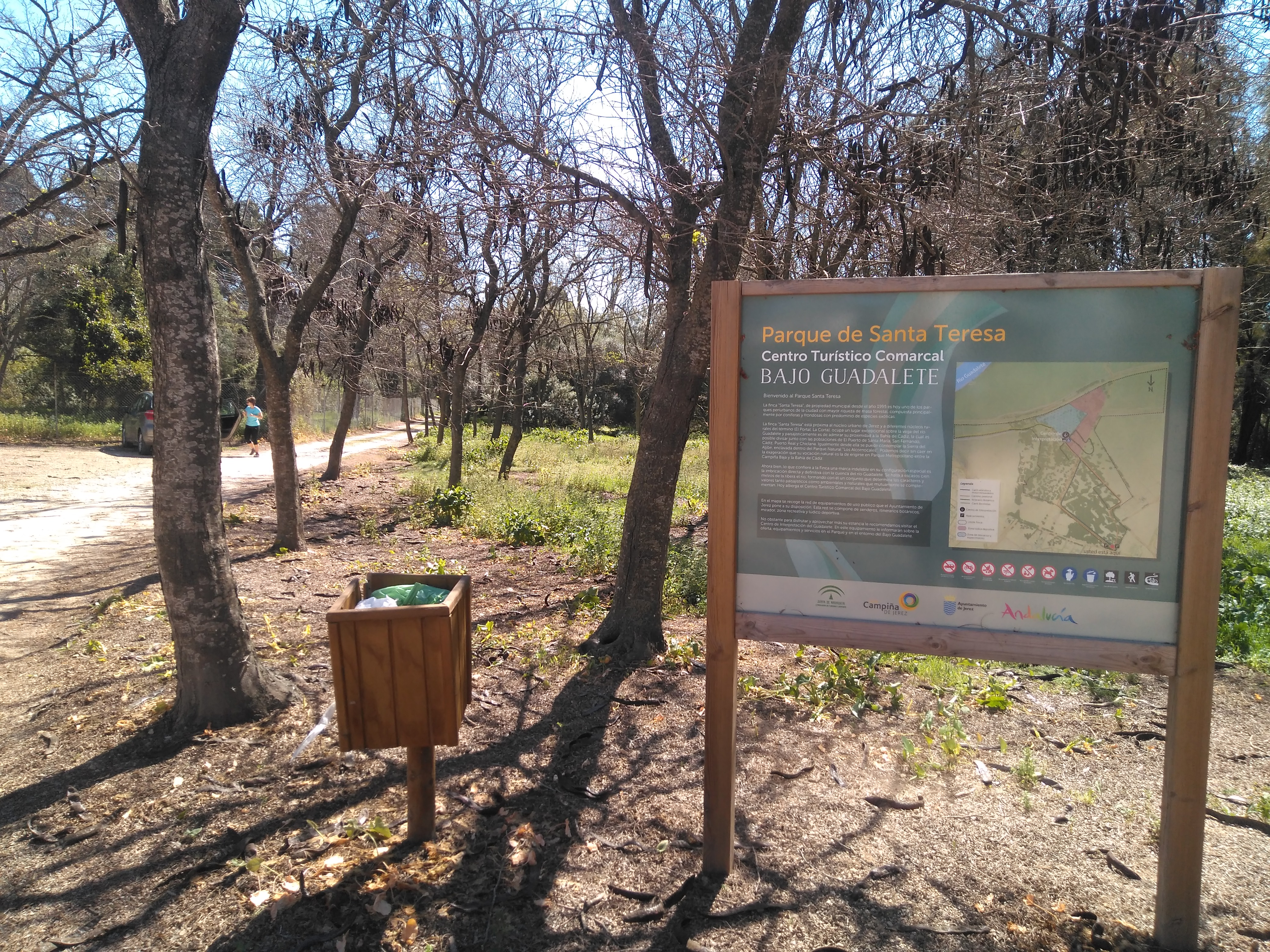 Parque de Santa Teresa en Jerez de la Frontera